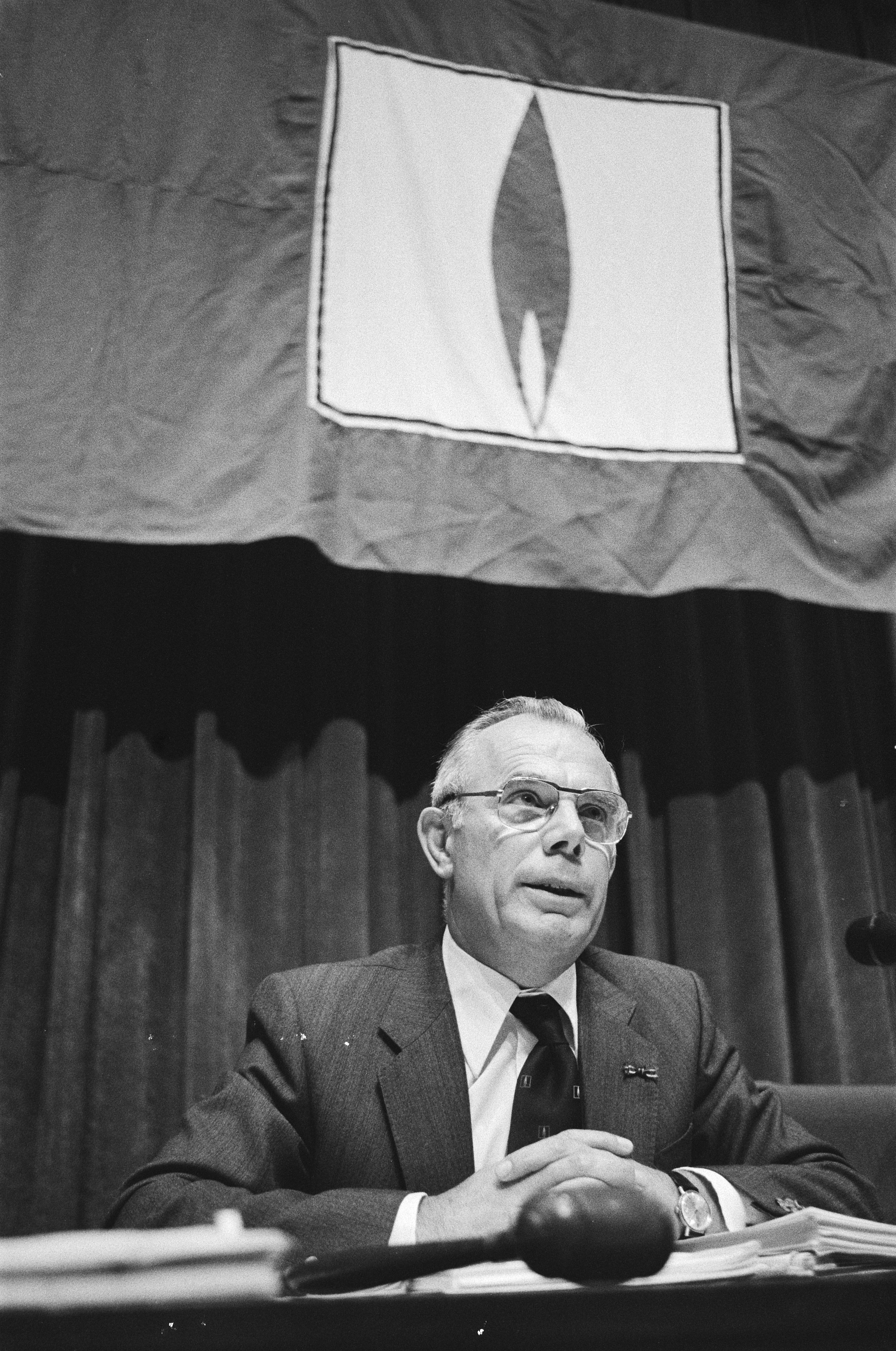 Collectie / Archief : Fotocollectie Anefo Reportage / Serie : Vergadering VEGIN (Vereniging Exploitanten Gasbedrijven in Nederland) in Jaarbeurs te Utrecht over prijsstijging van aardgas; Beschrijving : Drh. Kaland, voorzitter VEGIN Datum : 18 juni 1981 Locatie : Utrecht (provincie), Utrecht (stad) Trefwoorden : energiebeleid, verenigingen, vergaderingen, voorzitters Persoonsnaam : Kaland, A.J. Fotograaf : Bogaerts, Rob / Anefo Auteursrechthebbende : Nationaal Archief Materiaalsoort : Negatief (zwart/wit) Nummer archiefinventaris : bekijk toegang 2.24.01.05 Bestanddeelnummer : 931-5493